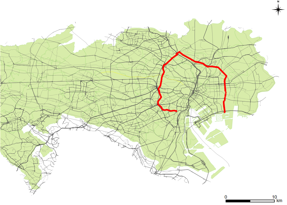 明治通り道路路線図